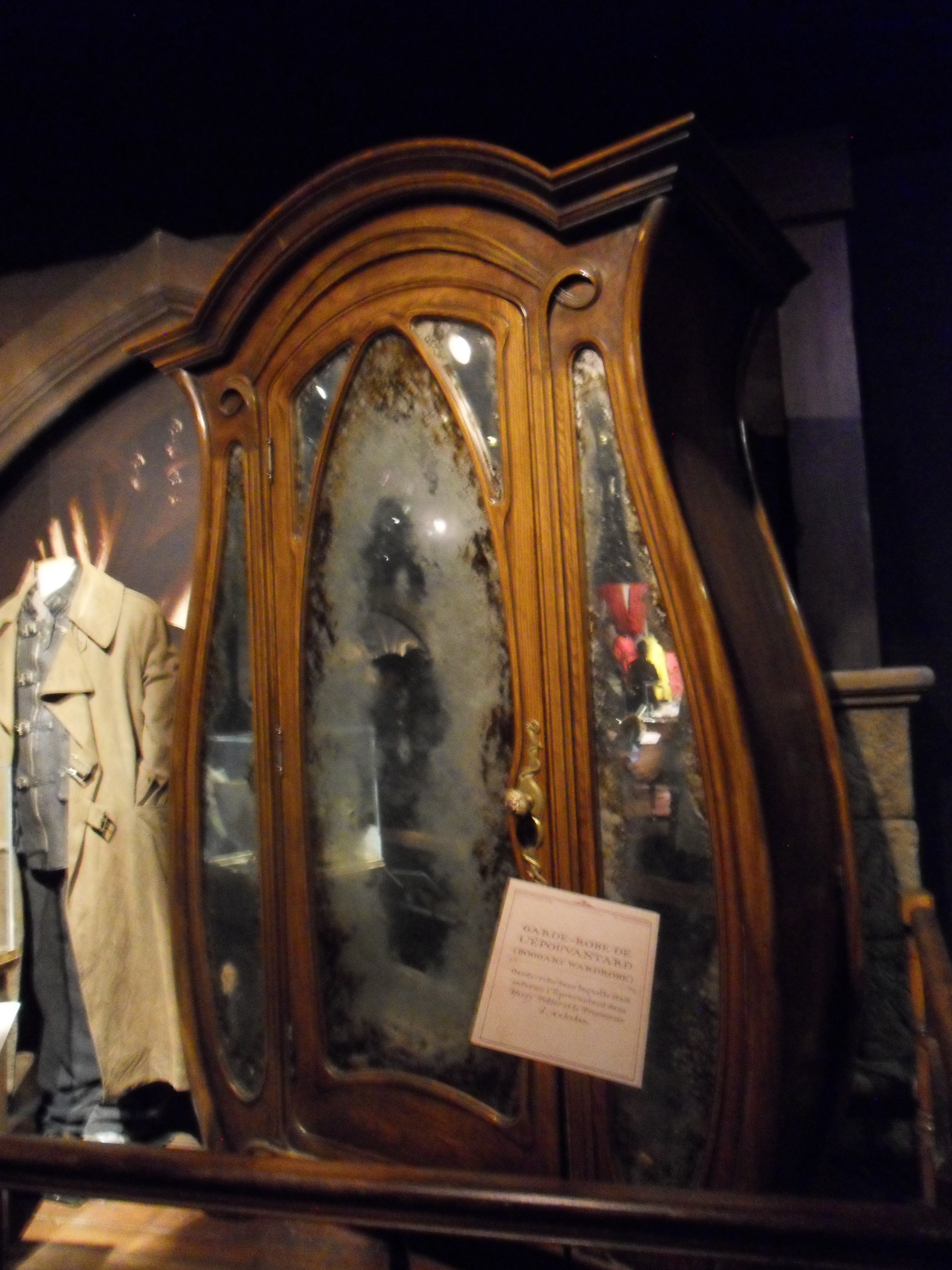 Penderie, classe de défense contre les forces du mal, Harry Potter Exhibition, Cité du Cinéma, Saint Denis (Paris) avril 2015